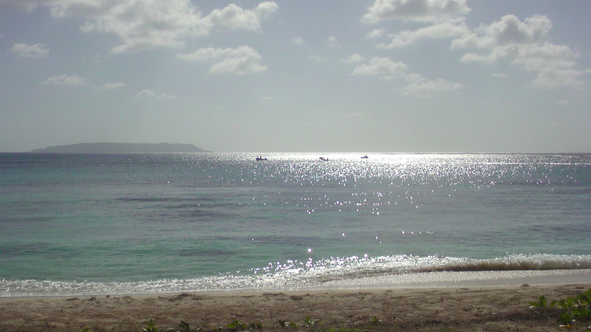 タチョンガビーチ